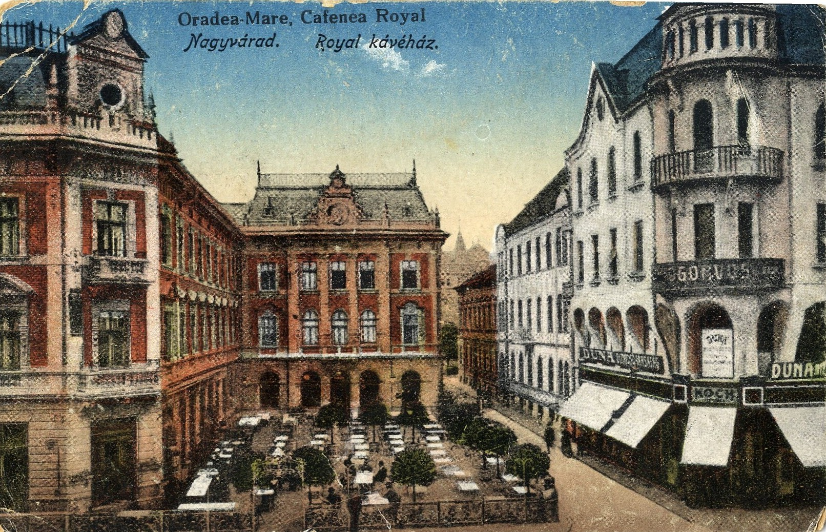 Nagyvárad Royal kávéház - Rimanóczy szálló. Képeslap